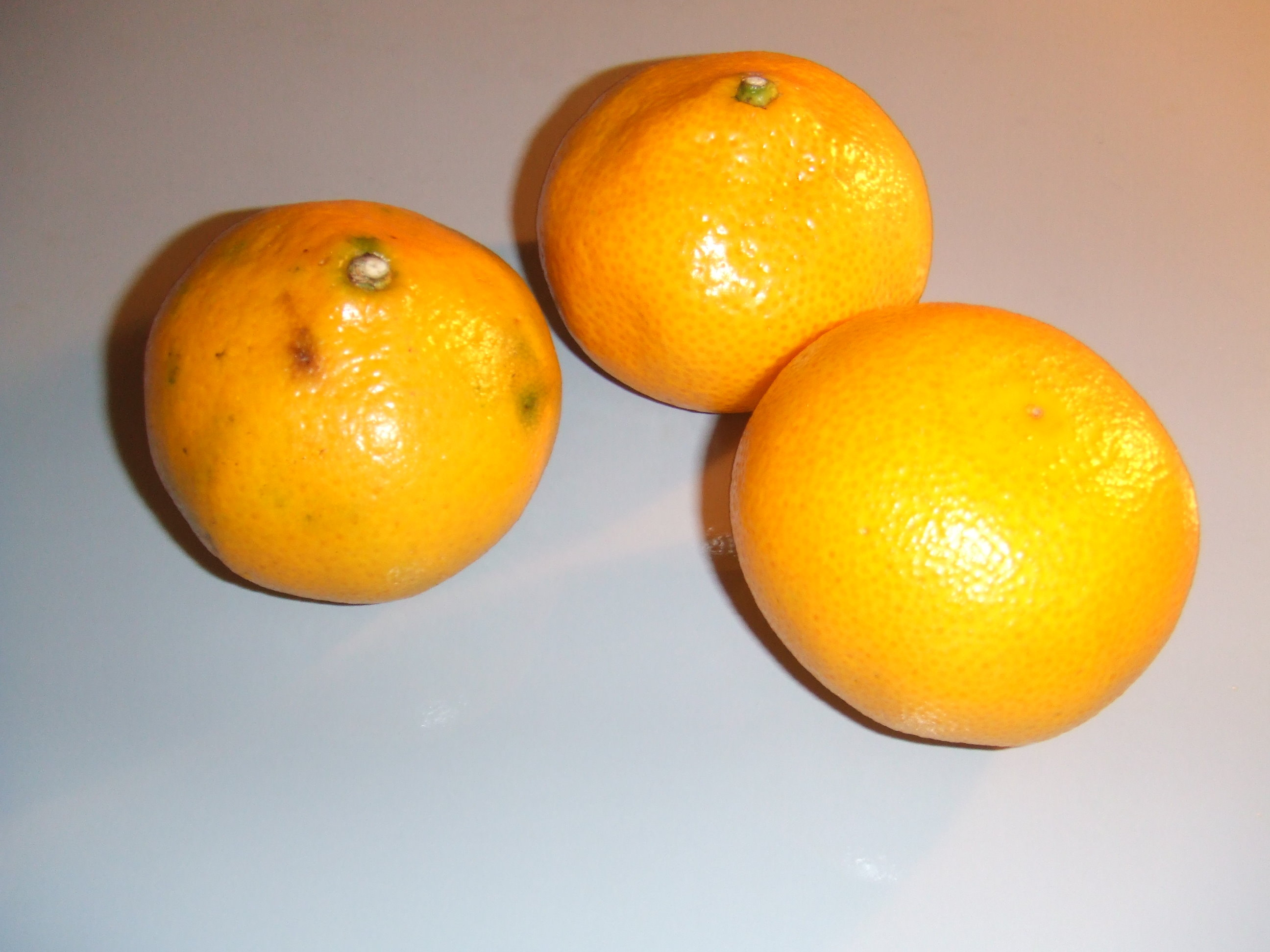 Satsuma uit Chili, gekocht op de Binnenrotte markt in Rotterdam